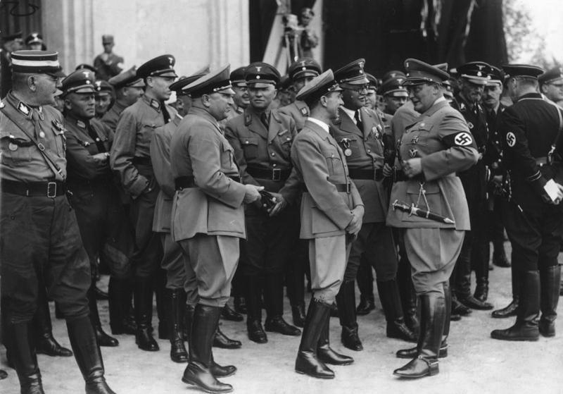 Nürnberg, Luitpoldhalle, Reichsparteitag 8. -14. September 1936 Reichsparteitag 1936 Vor der Luitpoldhalle in Erwartung des Führers Ministerpräsident Göring, Reichsleiter Schwarz, Reichsminister Dr. Goebbels, Reichsstatthalter Mutschmann, Reichsorganisationsleiter Dr. Ley Abgebildete Personen: Göring, Hermann: Reichsmarschall, Oberbefehlshaber der Luftwaffe, Ministerpräsident von Preußen, Deutschland Goebbels, Joseph: Reichsminister für Volksaufklärung und Propaganda, Gauleiter Berlin, Deutschland Mutschmann, Martin: Gauleiter, Reichsstatthalter in Sachsen, Deutschland (GND 117204587) Ley, Robert: Reichsorganisationsleiter, Deutsche Arbeitsfront (DAF), Generalrat der Wirtschaft, Deutschland Schwarz, Franz Xaver: Reichsschatzminister der NSDAP, Deutschland